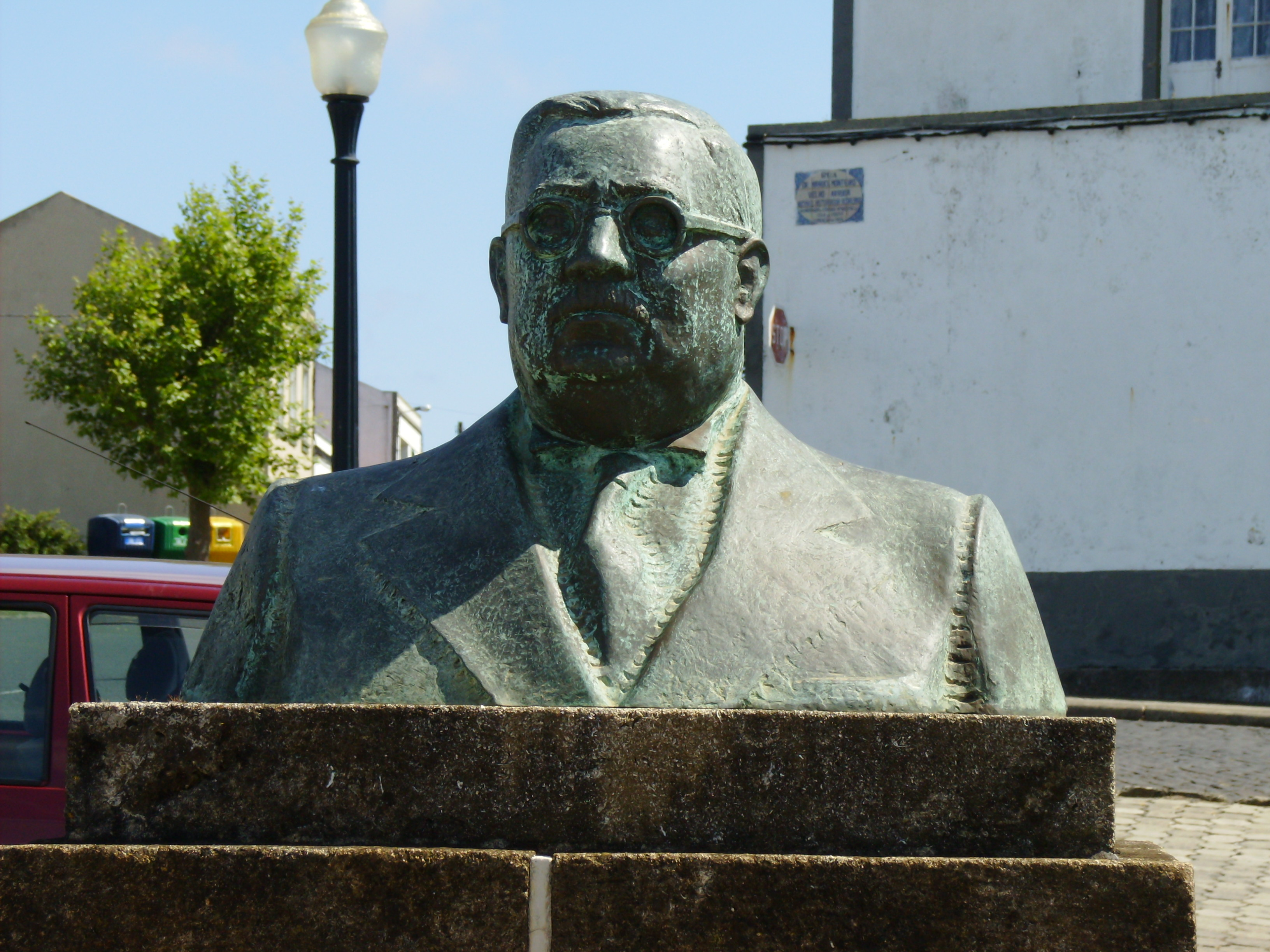 Busto em bronze do Dr. Manuel Monteiro Velho Arruda em Vila do Porto, Ilha de Santa Maria (Açores), Portugal.